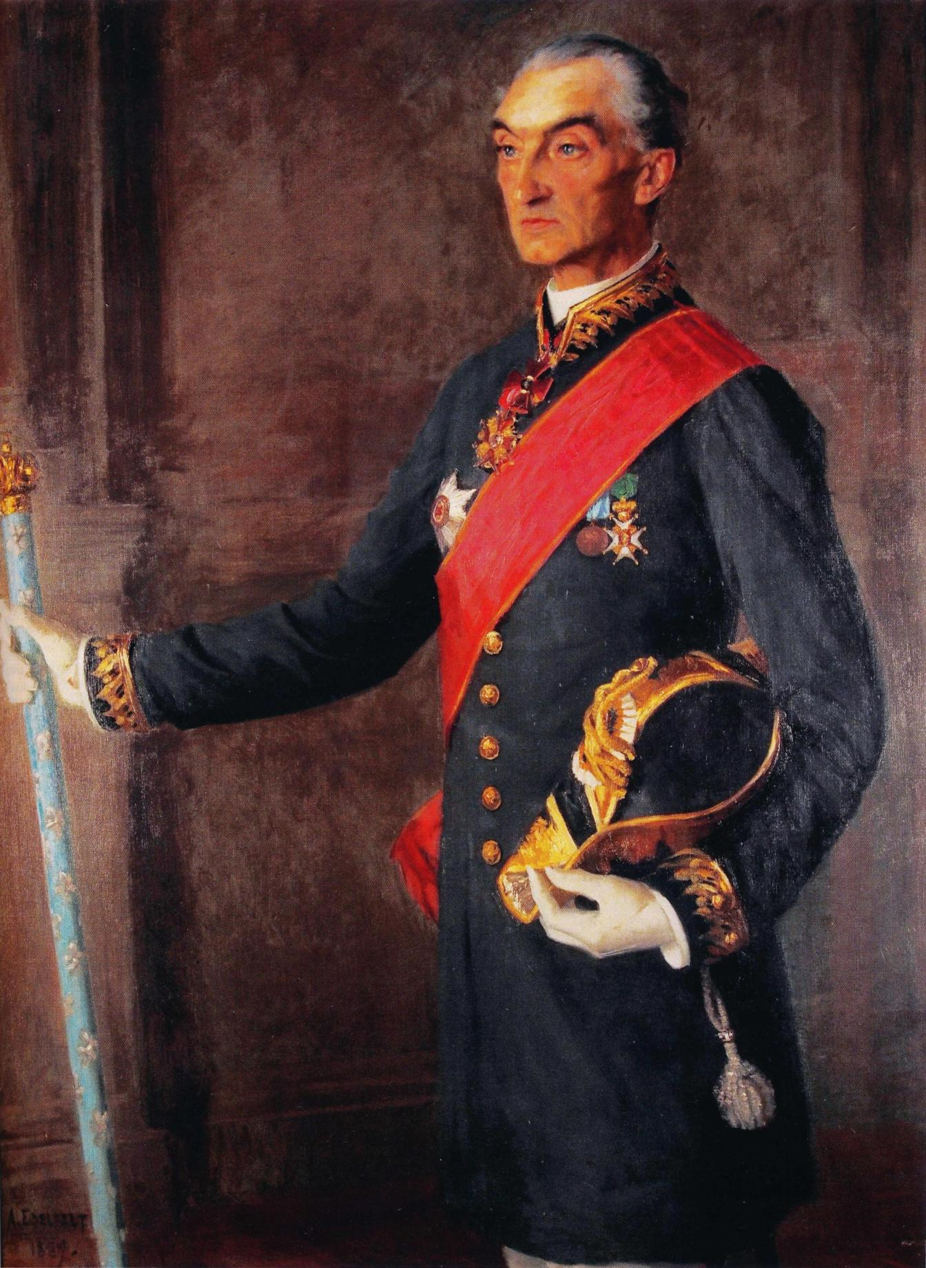 Maamarsalkka ja senaattori Victor von Haartman (1830–1895). Aatelissäädyn tilaama muotokuva, omistaja Ritarihuone.